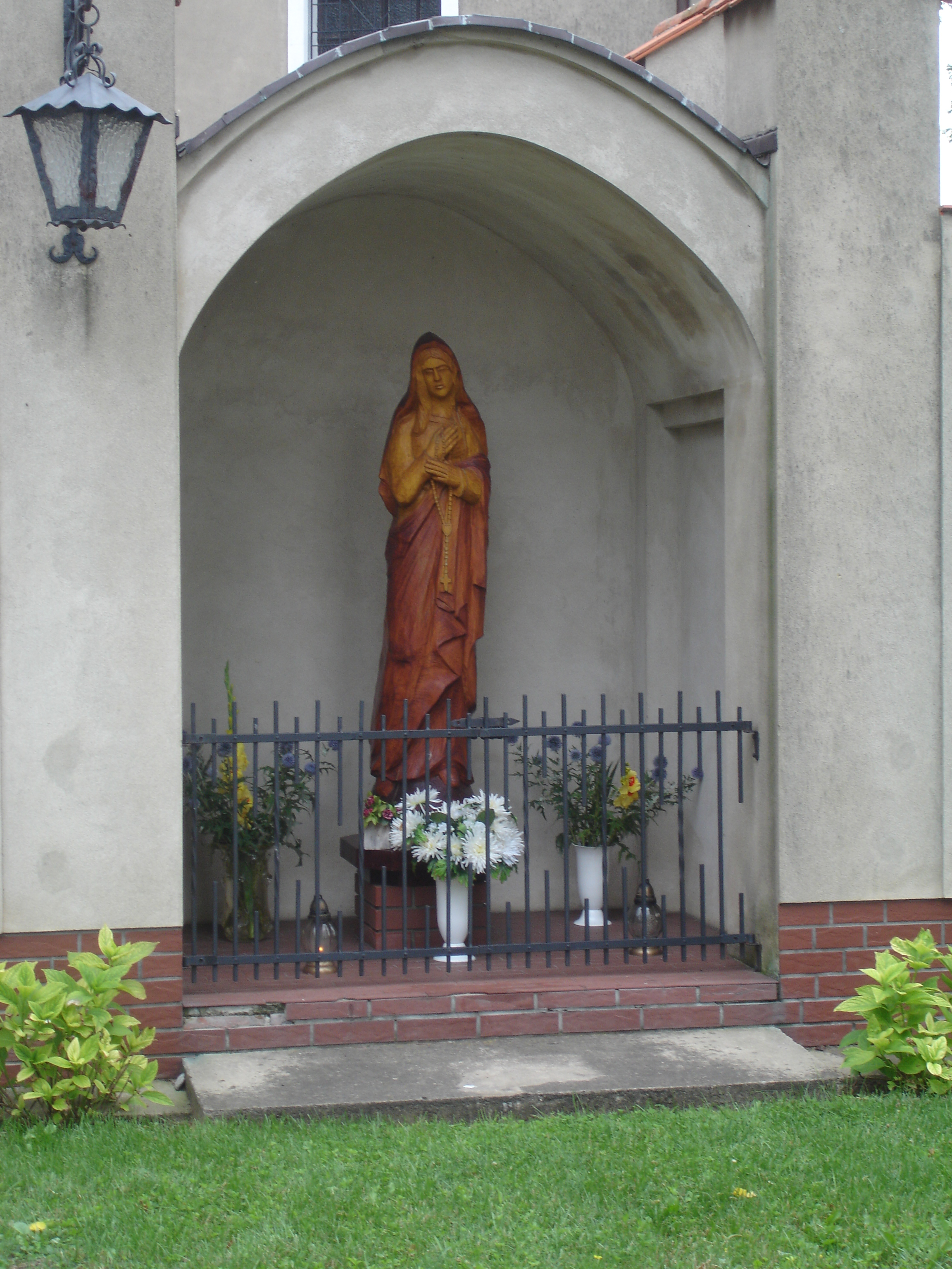 Grota z figura Matki Boskiej Królowej Różańsca Świętego wPawłowicach